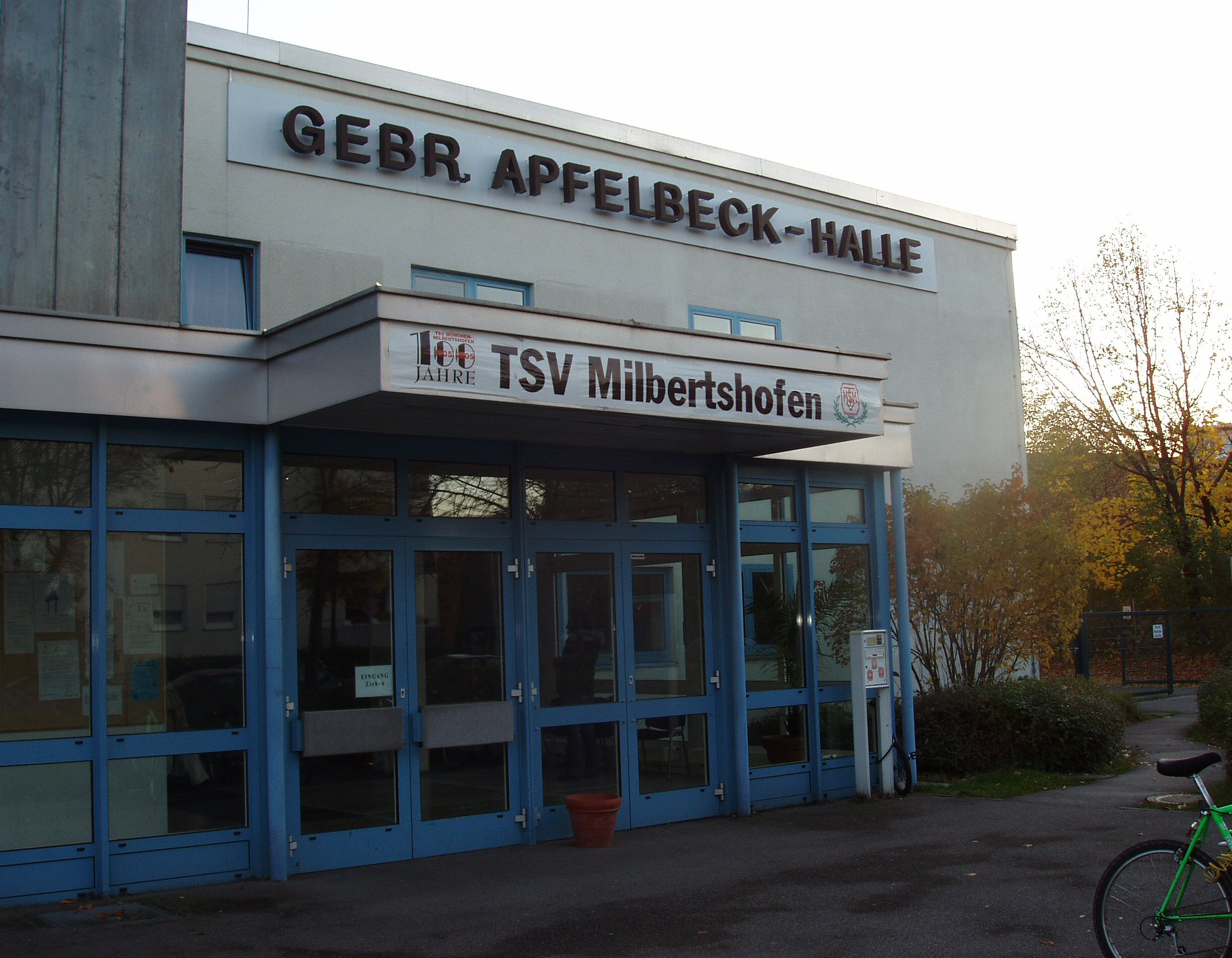 München, TSV Milbertshofen, Haupteingang zur Handball-Halle